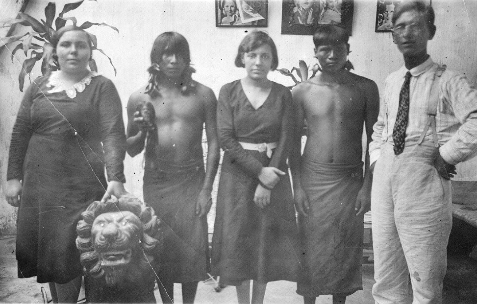 Graña junto a Mariano el Brujo y un grupo de técnicos occidentales